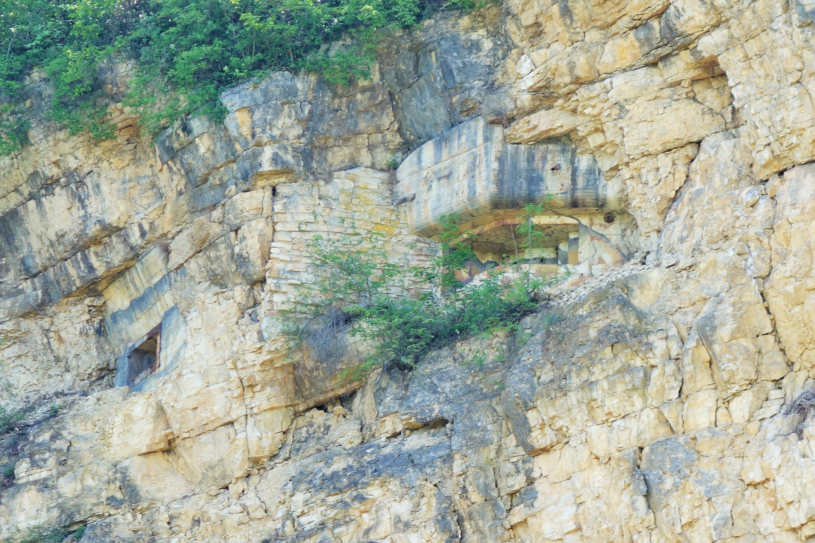 Sperrstelle Hülftenschanze, Frenkendorf BL, Schweiz